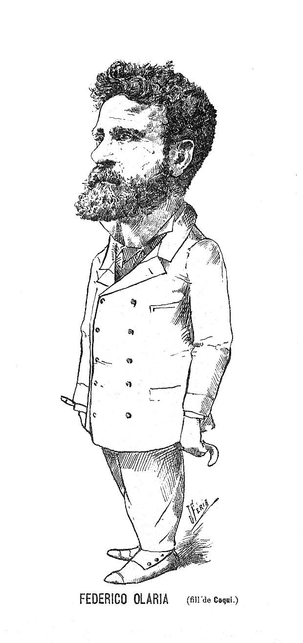 Caricatura de Federico Olaria